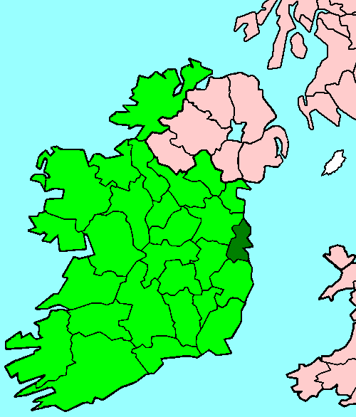 Dublin